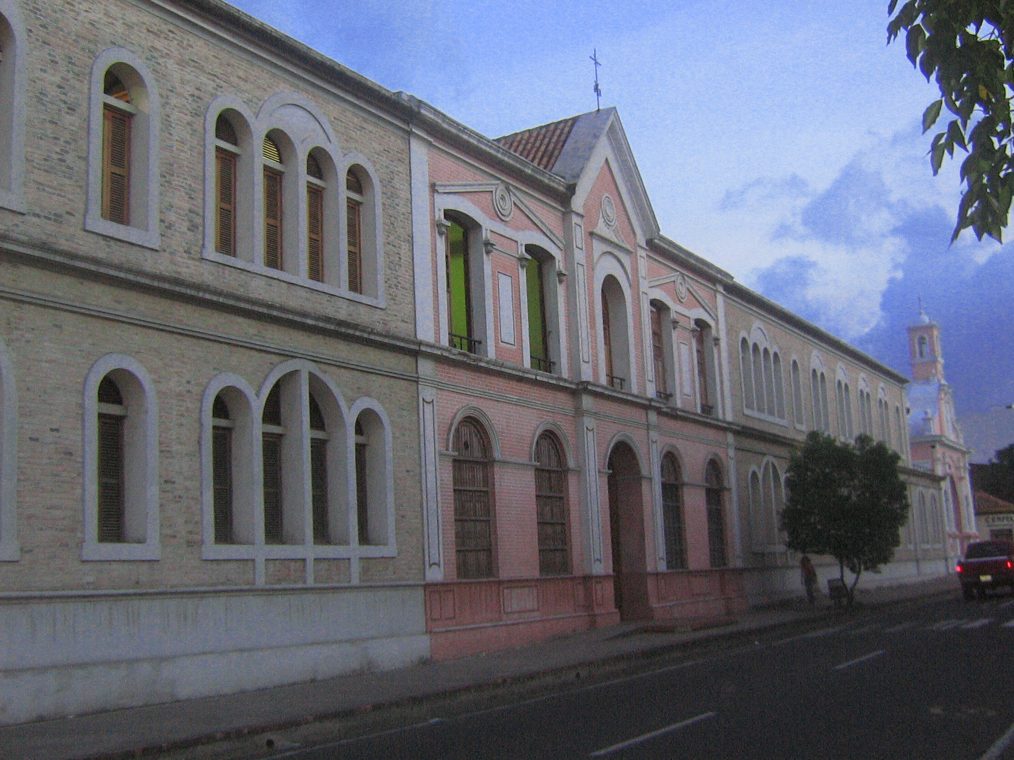 Biblioteca Julio Perez Ferrero